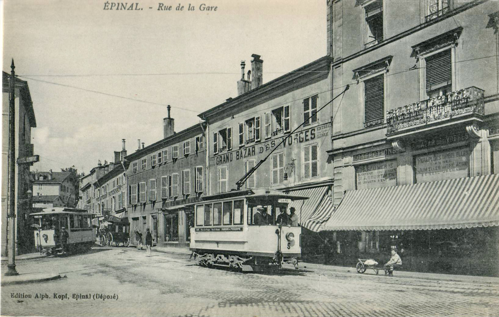 Carte postale ancienne éditée par Alph. Kopf à Épinal :ÉPINAL - Rue de la Gare